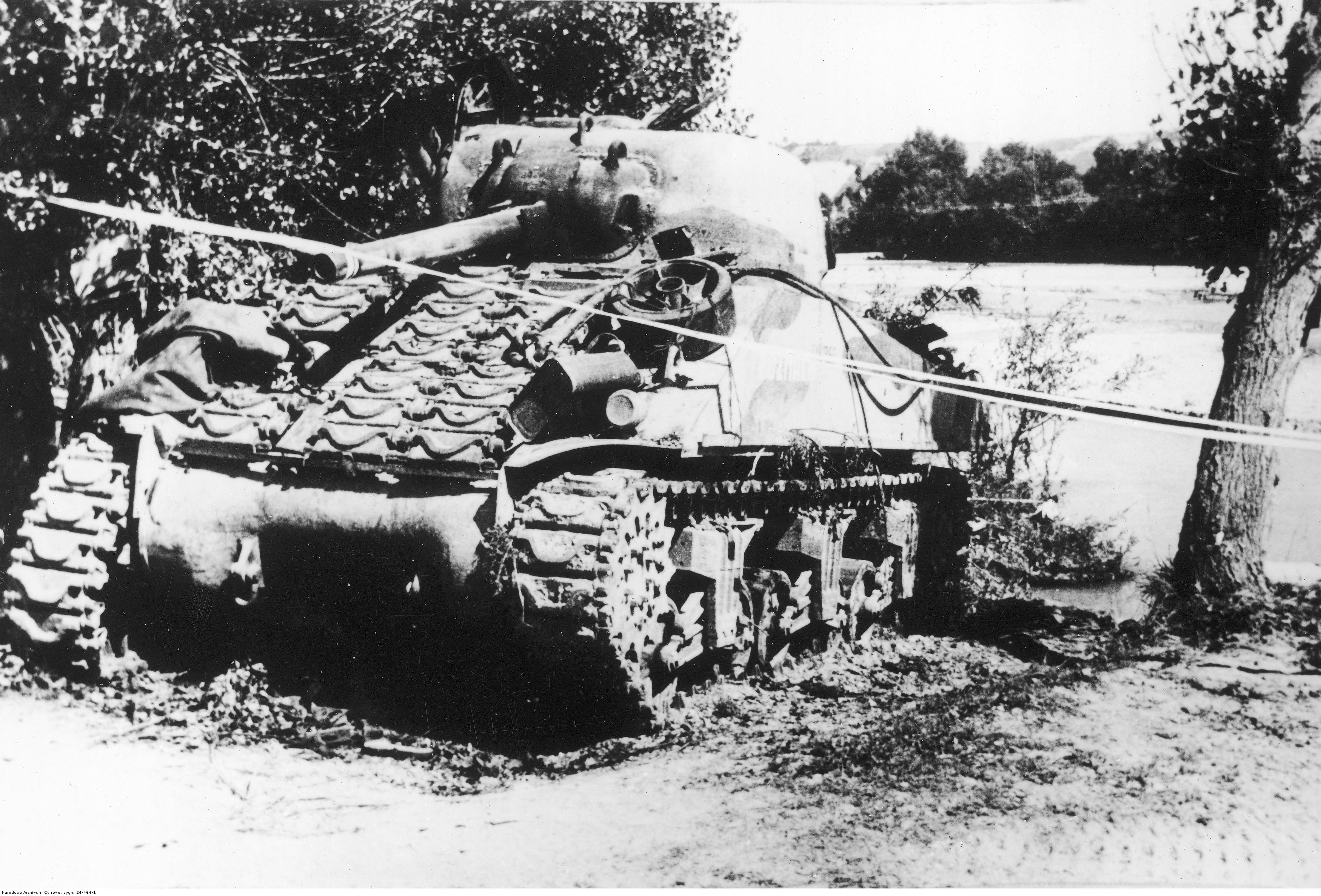 Forsowanie rzeki Chienti przez żołnierzy 2 Korpusu Polskiego podczas bitwy o Ankonę.Czołg M4 Sherman "Rozmach" z 1 Pułku Ułanów Krechowieckich uszkodzony przez minę po przekroczeniu rzeki Chienti. Archiwum Fotograficzne Tadeusza Szumańskiego. Sygnatura: 24-464-1